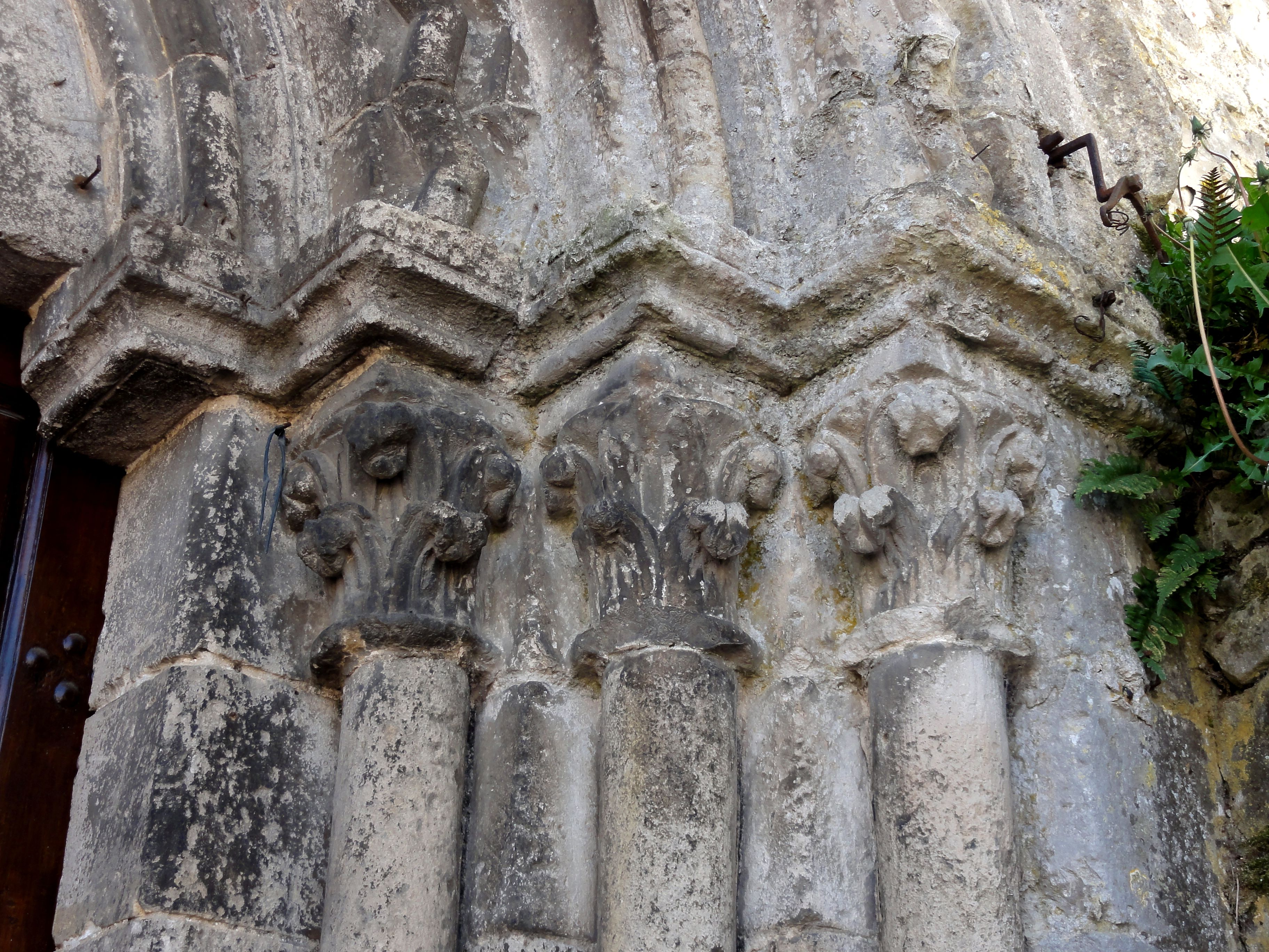 Portail occidental, chapiteaux.